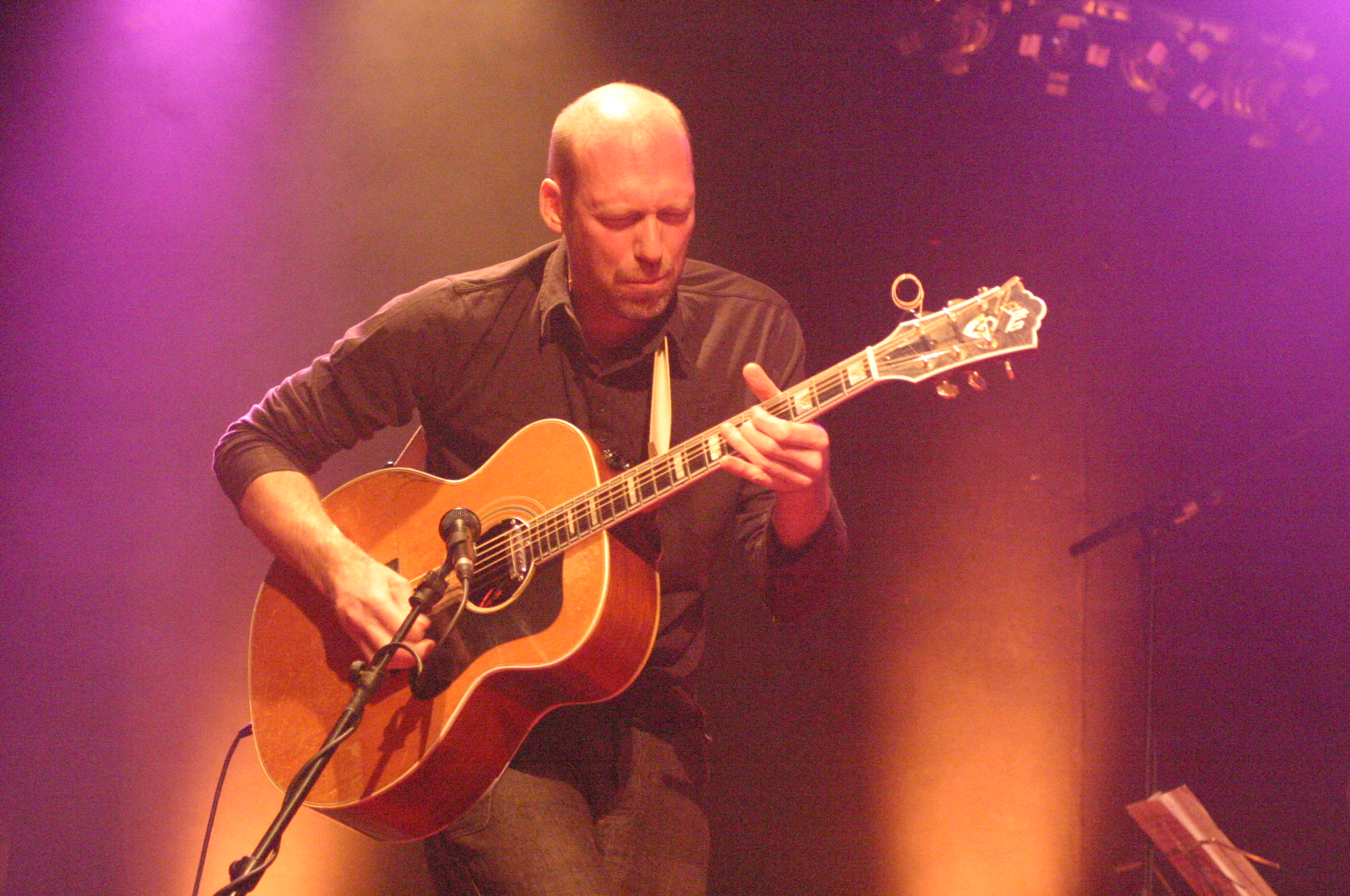 Hasse Poulsen, 2010-02-03